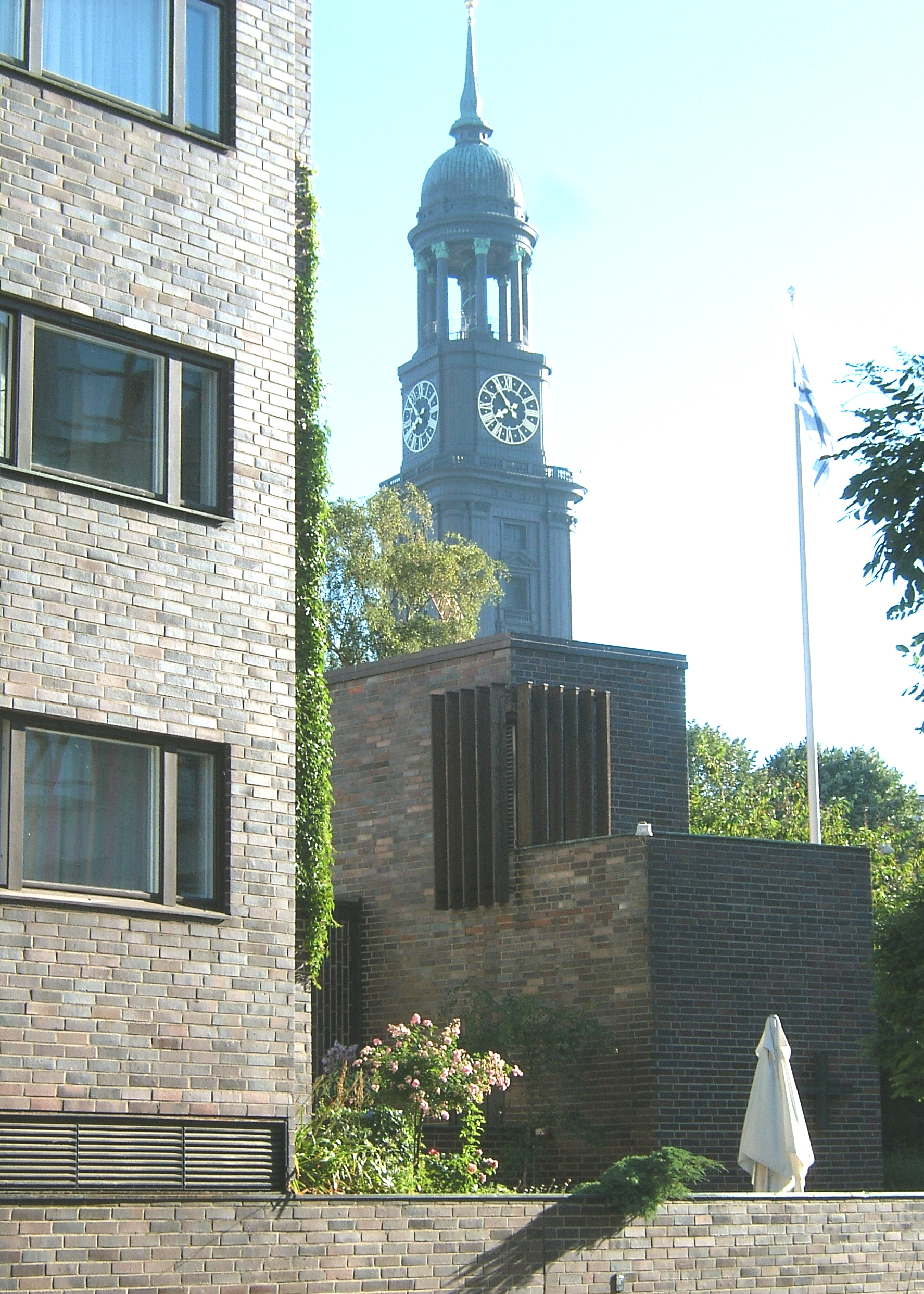 Hamburg, Neustadt, Finnische Seemannskirche, Ditmar-Koel-Straße 6, Hamburg-Neustadt-Süd. Im Hintergrund ist die Hauptkirche St. Michaelis zu sehen. This is a photograph of an architectural monument.